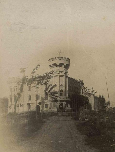 Castillo de Sant Marçal Serraparera finales del siglo XIX